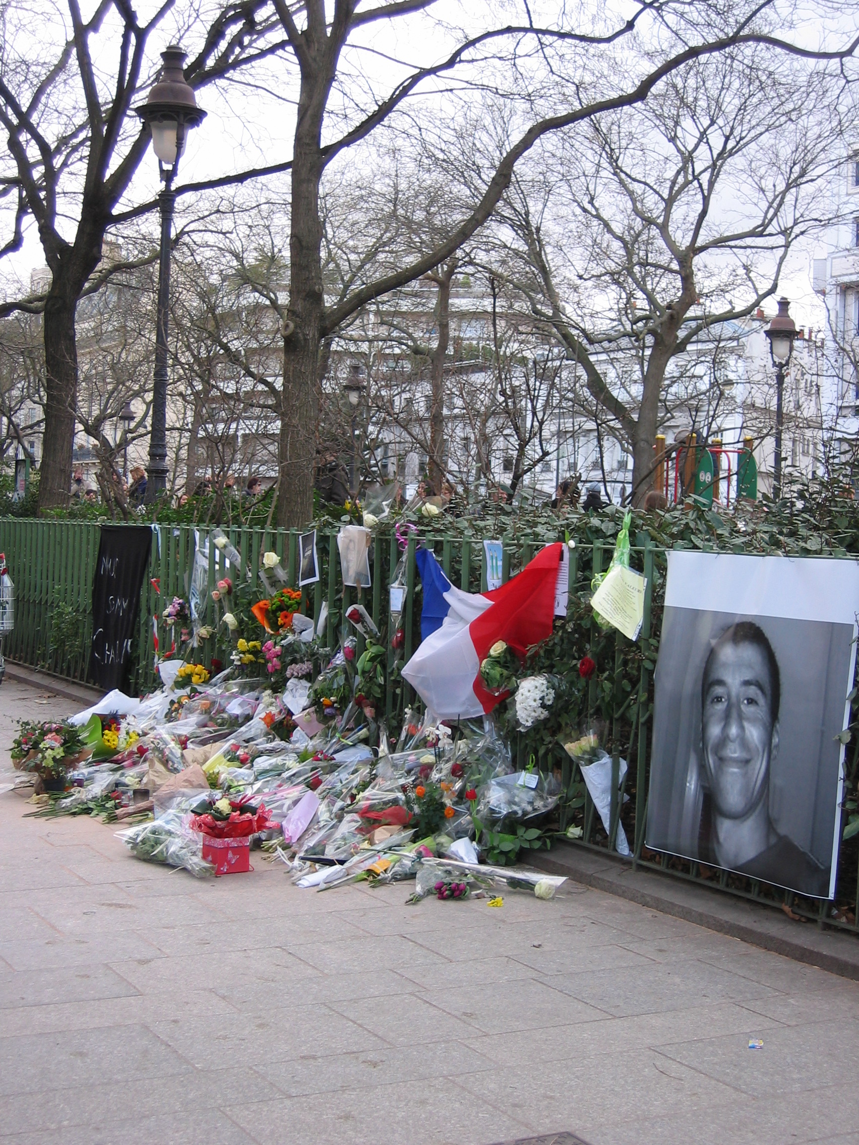 Lieu Boulevard Richard Lenoir où a été assassiné le policier Ahmed Merabet, le 7 janvier 2015, par les terroristes qui avaient attaqué Charlie Hebdo.